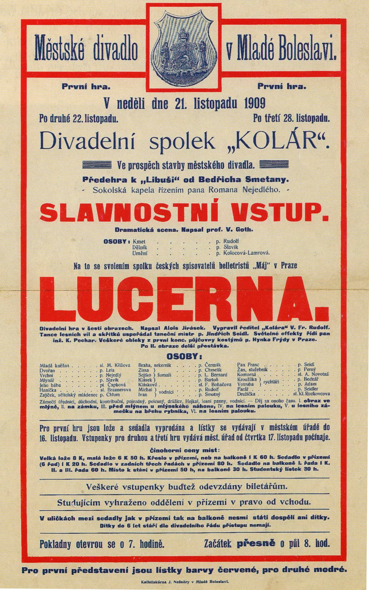 Plakát ke slavnostnímu otevření Plakát ke slavnostnímu představení na oslavu vzniku Československé republiky - ochotnický soubor Kolár, městského divadla v Mladé Boleslavi (21. listopadu 1909)